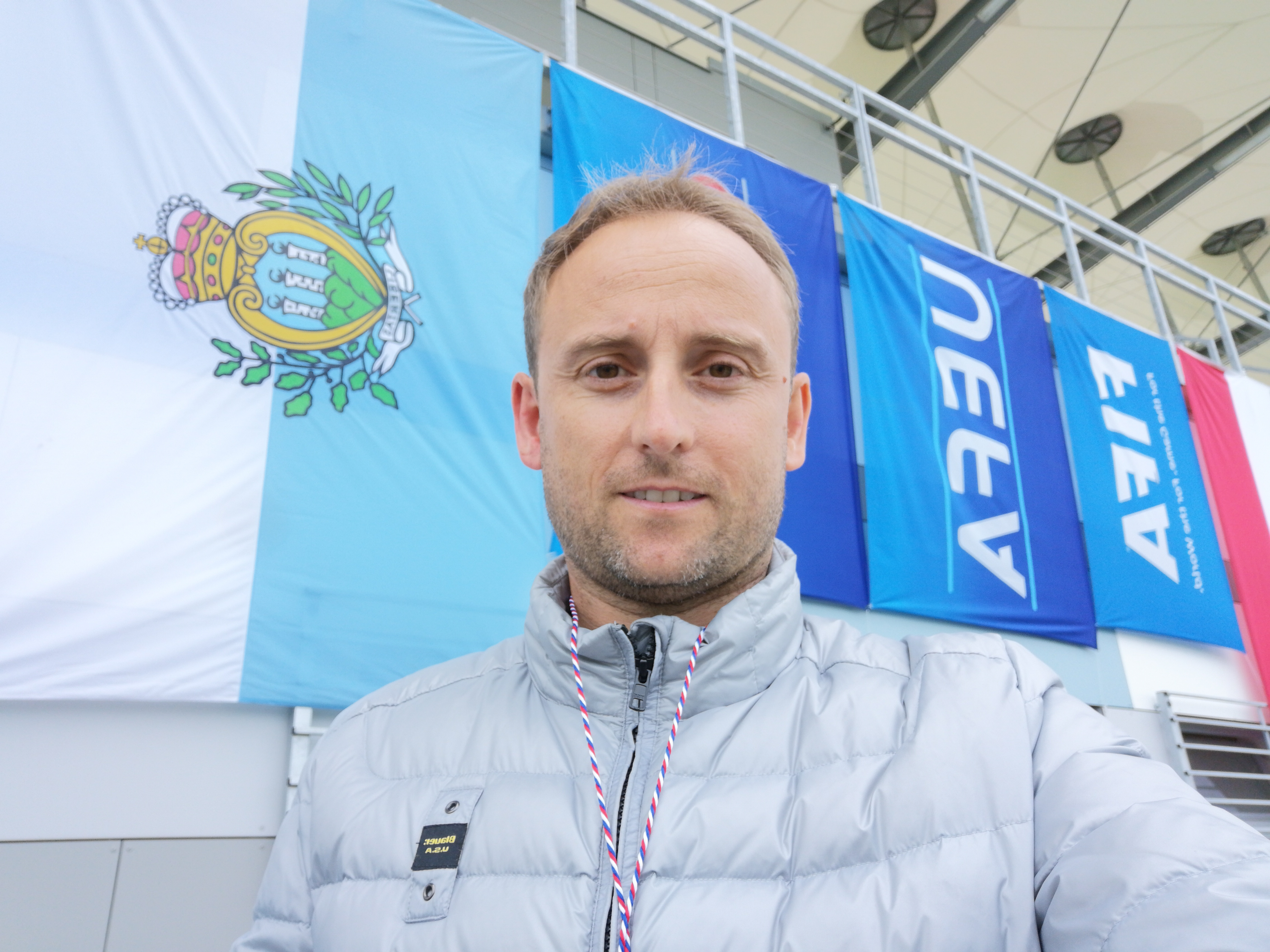 Autoscatto della foto di Elia Gorini, giornalista sportivo